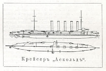 Данное изображение было использовано в статье «Аскольд» опубликованной в третьем томе «Военной энциклопедии», который был издан книгоиздательским товариществом Ивана Дмитриевича Сытина в 1911 году в столице Российской империи городе Санкт-Петербурге.